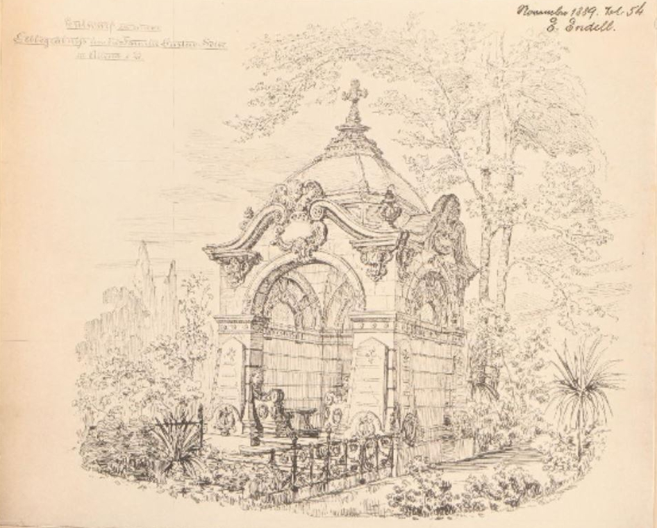 Entwurf für ein Mausoleum der Unternehmerfamilie Selve (Alter Friedhof Lüdenscheid)